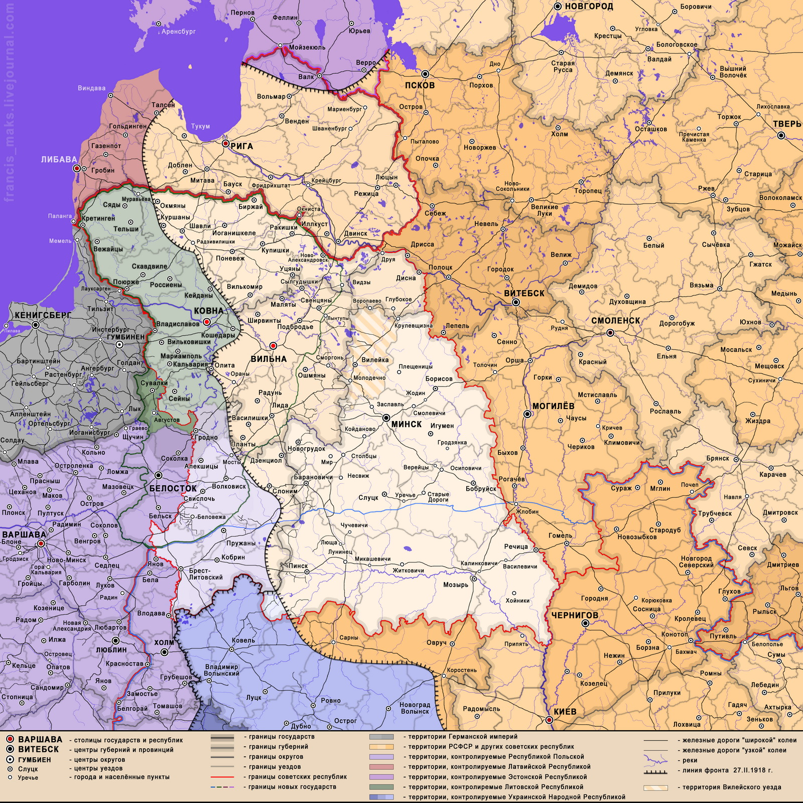 1919.II.27. Утварэнне Сацыялістычнай Савецкай Рэспублікі Літвы і Беларусі